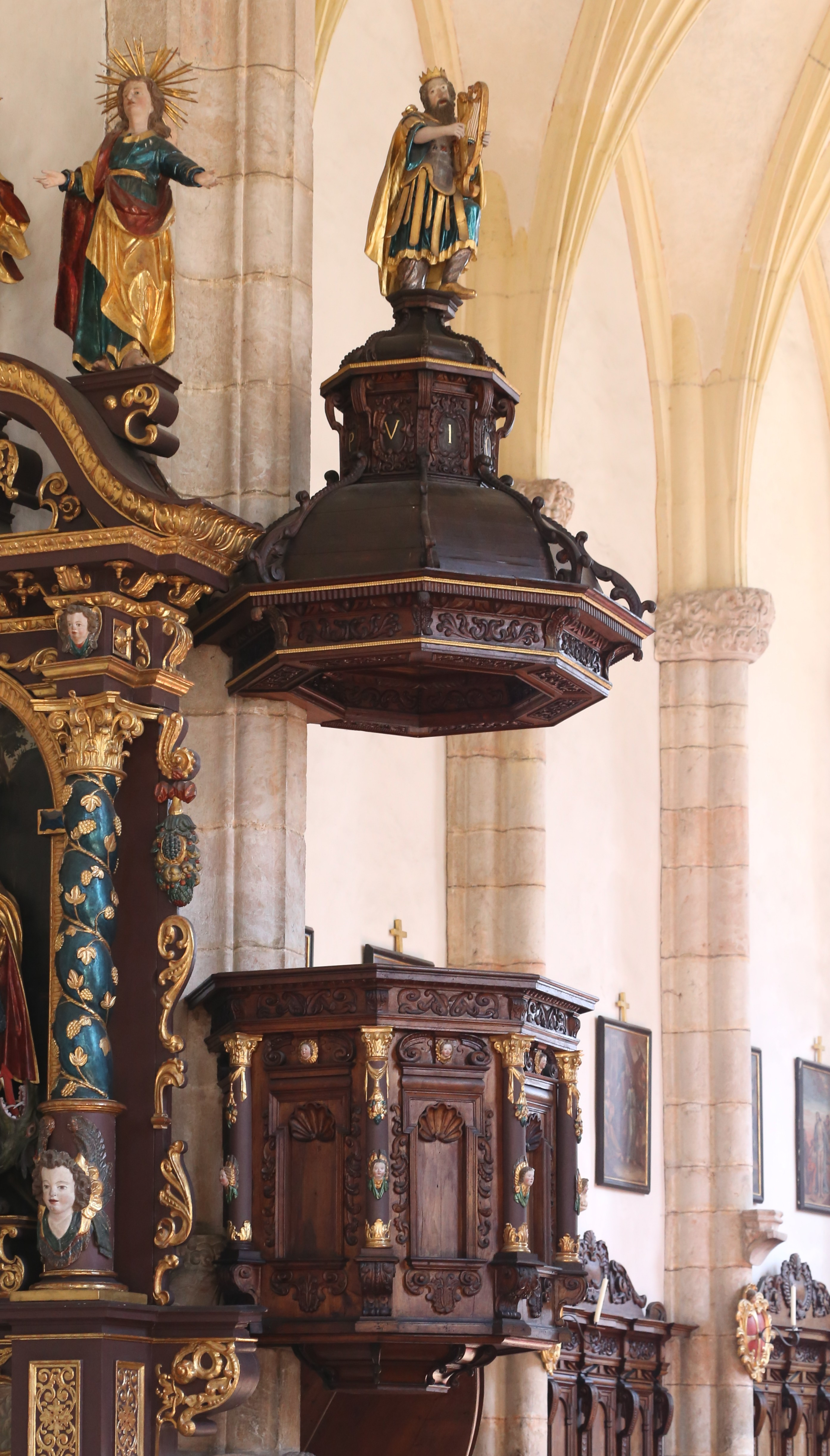 Filialkirche hl. Leonhard, Kundl; spätgotischer Bau mit hohem Turm an der Südwestecke, von Mauer umgeben. Einheitlicher Bau um 1480 bis Anfang 16. Jahrhundert This media shows the remarkable cultural object in the Austrian state of Tyrol listed by the Tyrolean Art Cadastre with the ID 3207. (on tirisMaps, pdf, more images on Commons)